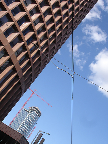 photographie d'un panorama de Lyon Part-Dieu.